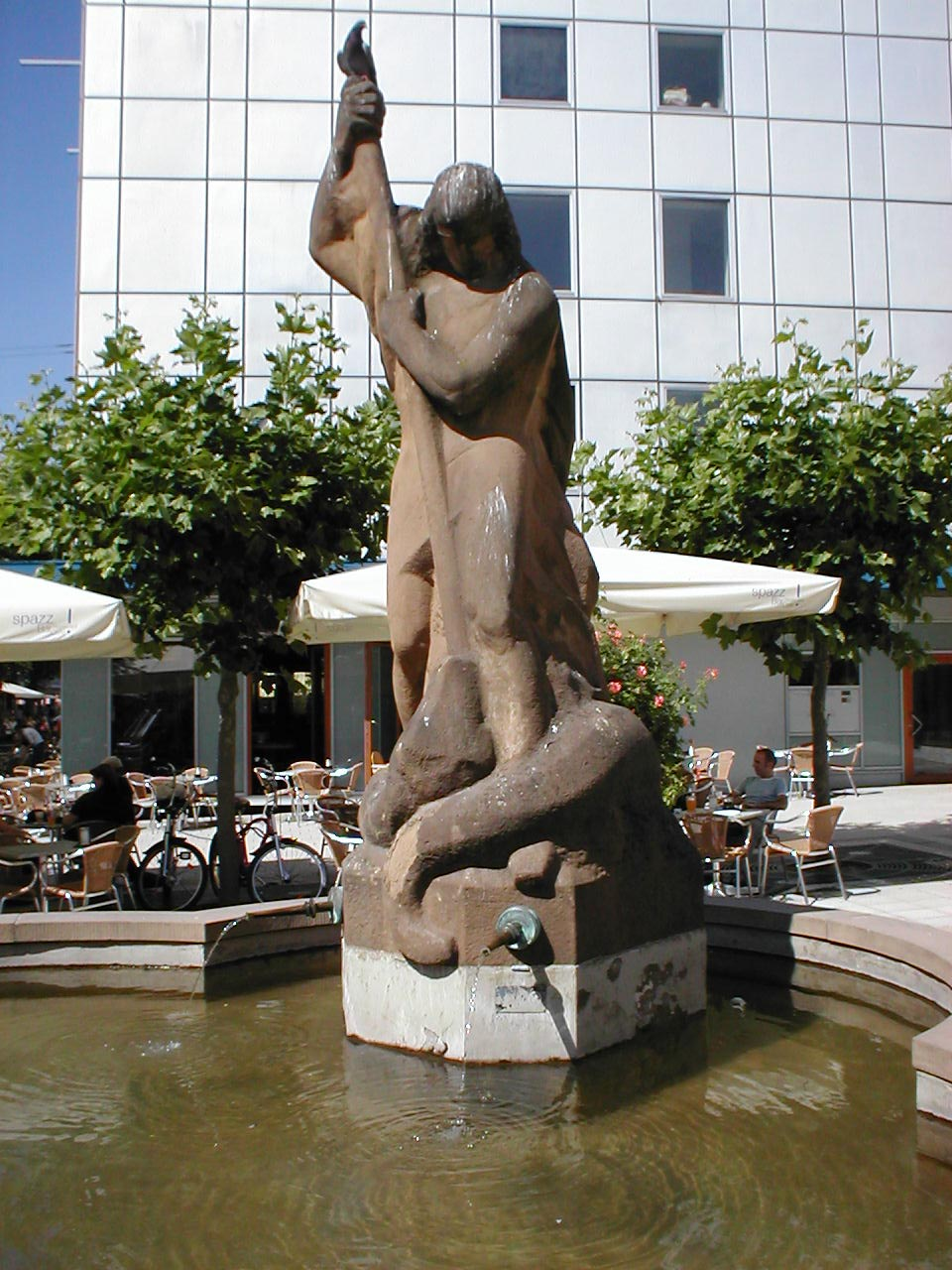 Heilbronn, Hafenmarktbrunnen. Neu 1955 von Ernst Yelin in Anlehnung an das 1944 zerstörte Original.